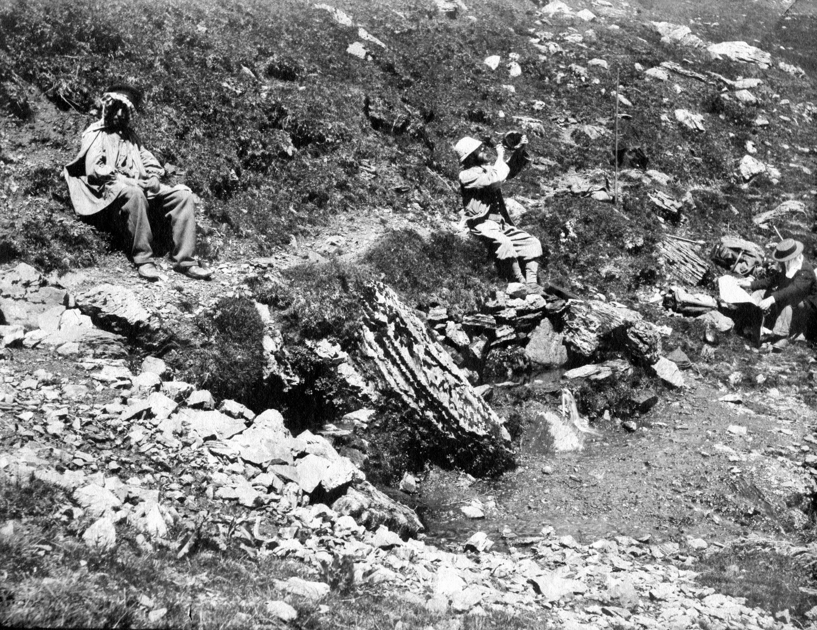 Fonds Trutat - Photographie ancienne Cote : TRU B 254 Localisation : Fonds ancien (S 30) Original non communicable Titre : Au col de Saleich [Saleix], vers Aulus, la fontaine, 17 juillet 1882 Auteur : Trutat, Eugène Rôle de l’auteur : Photographe Lieu de création : Vicdessos (Ariège ; canton) Date de création : 1882 Mesures : : 13 x 18 cm Observations : Notes manuscrites Trutat : "Obj[ectif] hémisph[érique] rapide ; papier Morgan ; B 197". Mot(s)-clé(s) : -- Montagne -- Rocher -- Végétation -- Pierre -- Fontaine -- Homme -- Costume masculin -- Randonnée pédestre -- Groupe -- Chapeau -- Canotier -- Gourde -- Boisson -- Carte -- Halte -- Sacoche -- Eté -- Regnault, Félix. [?] -- Saleix (Ariège) -- Auzat (Ariège) -- Vicdessos (Ariège ; canton) -- Vicdessos (France ; vallée) -- Pyrénées (France) -- Saleix, Col de (France) -- Aulus-les-Bains (Ariège) [Mention / citation] -- 19e siècle, 4e quart Médium : Photographies -- Négatifs sur papier -- Noir et blanc -- Morgan -- Paysages -- Portraits de groupe Bibliothèque de Toulouse. Domaine public